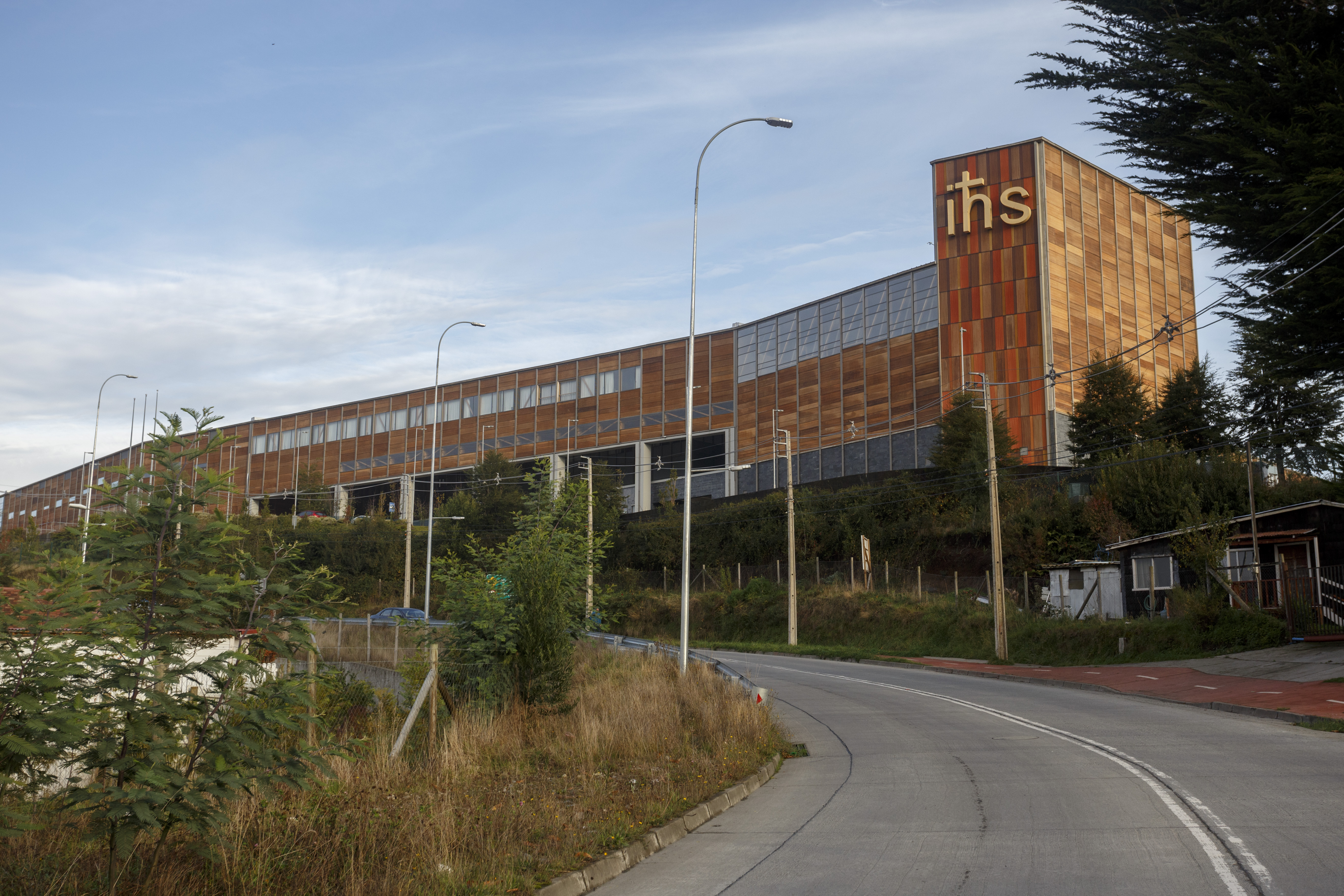 Colegio San Francisco Javier de Puerto Montt, Chile.